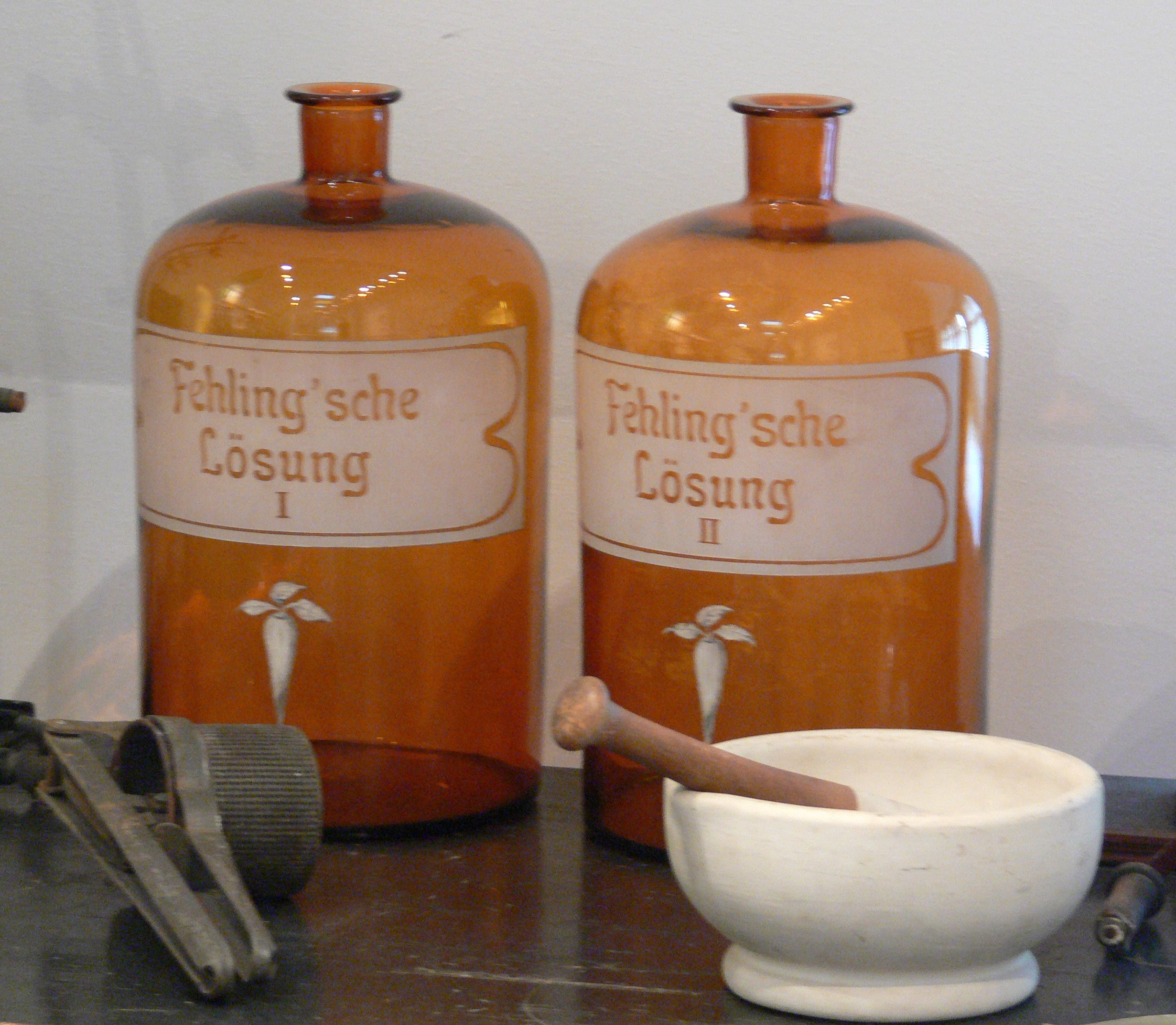 Vorratsflaschen für Fehling'sche Lösung I und Fehling'sche Lösung II, um 1904, Zucker-Museum Berlin (Originalinventar des Instituts für Zuckerindustrie)